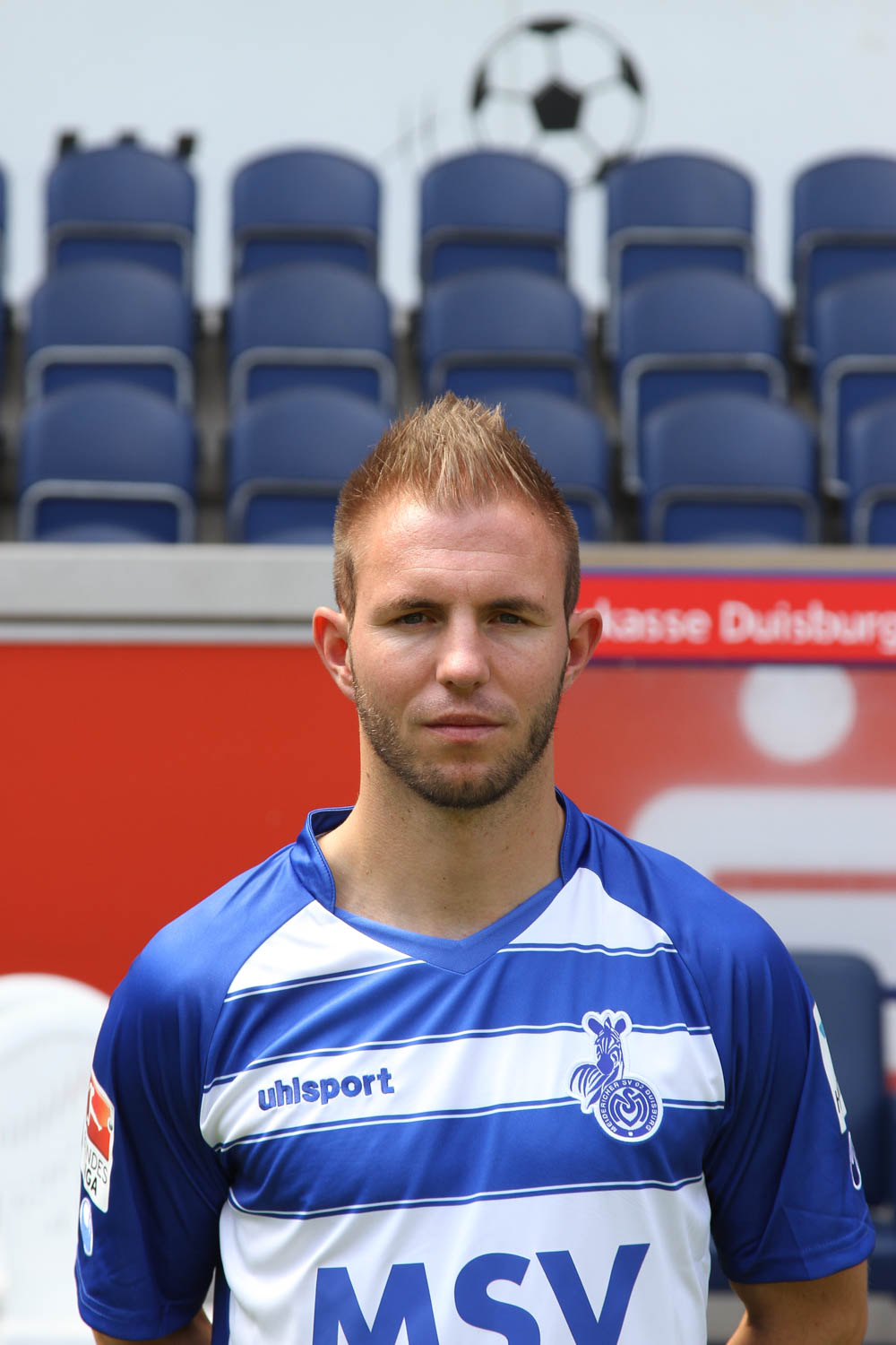 Pierre De Wit 2015